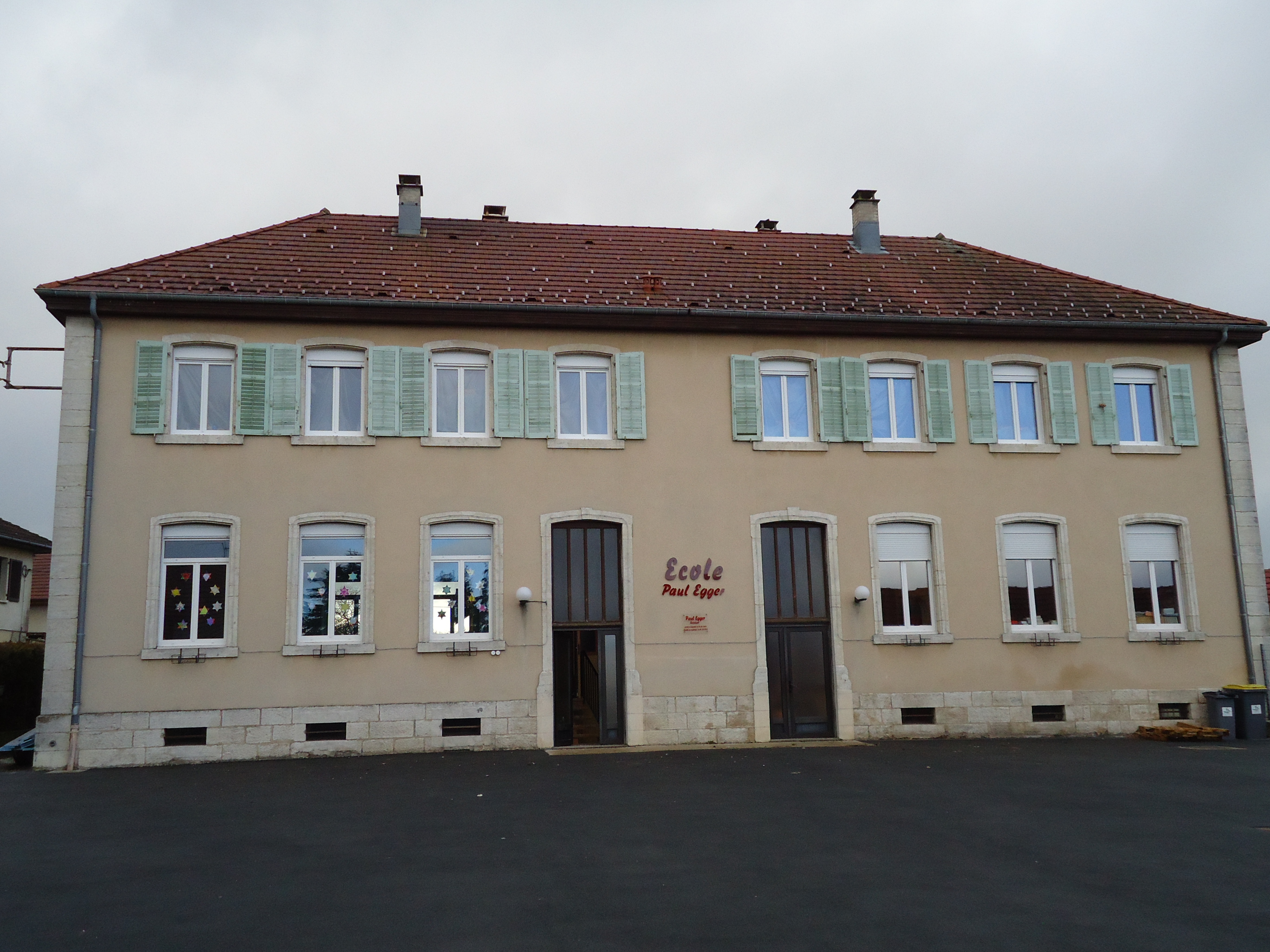 Ecole Paul Egger à Montbouton